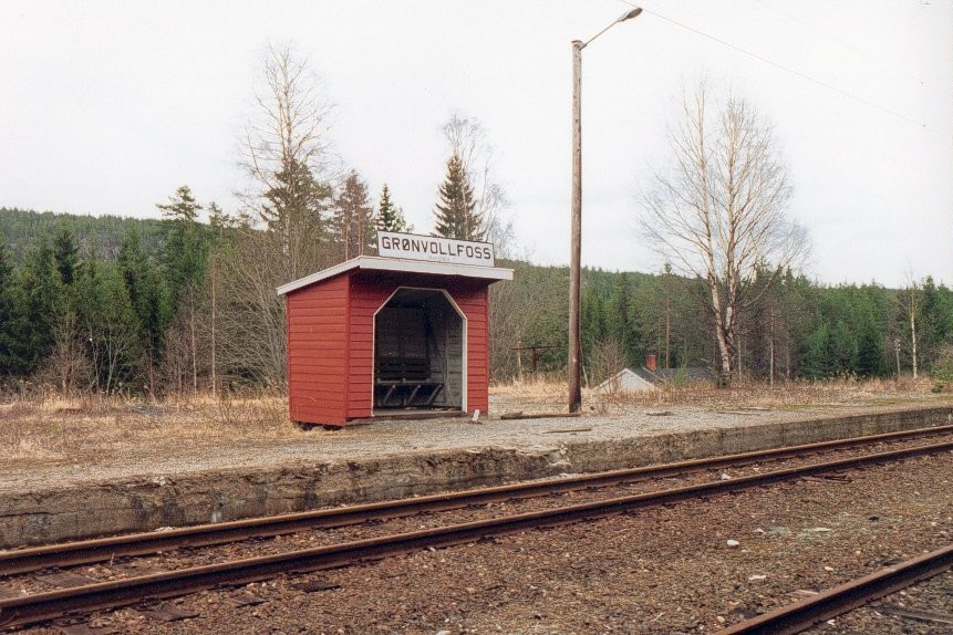 Grønvollfoss på Tinnosbanen, Telemark